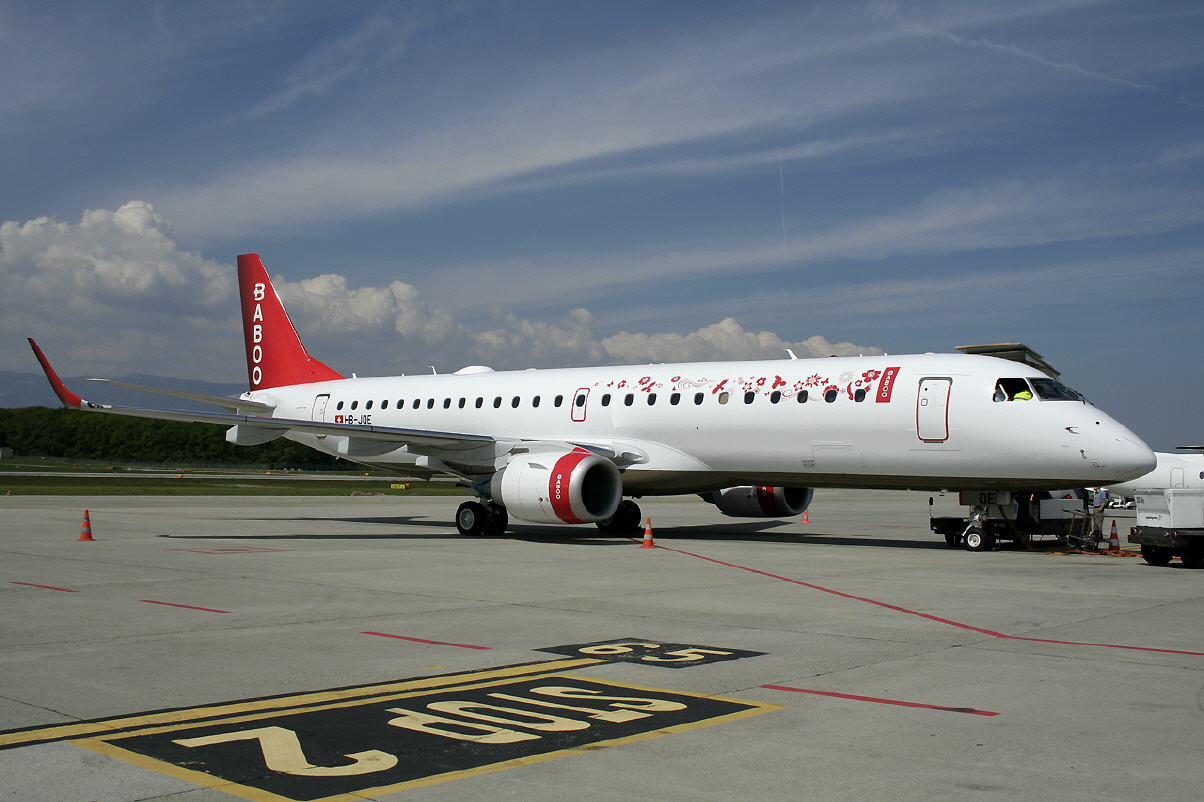 Flybaboo in Genf